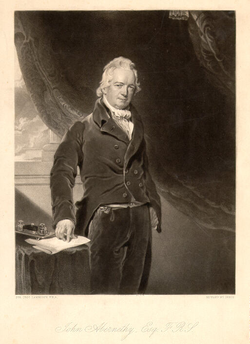 Der englische Chirurg und Anatom John Abernethy (1763–1831)